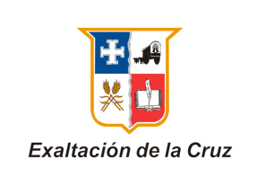 Bandera del Partido de Exaltación de la Cruz (Buenos Aires, Argentina).